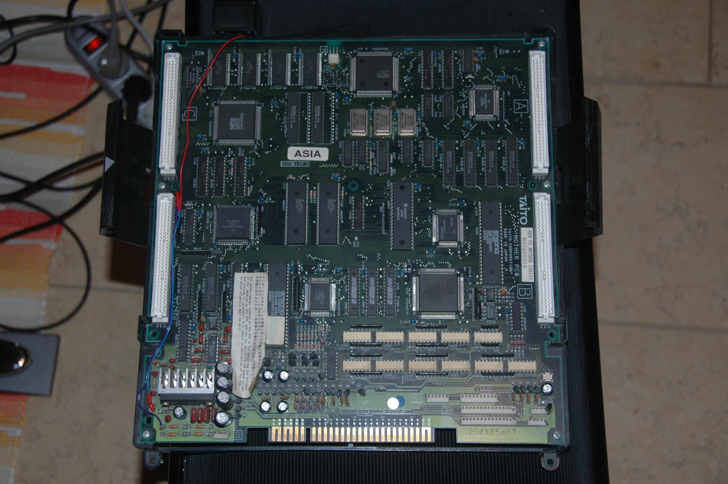 La mortherboard di Puzzle Bobble 2 originale Taito senza la daughter board con le roms